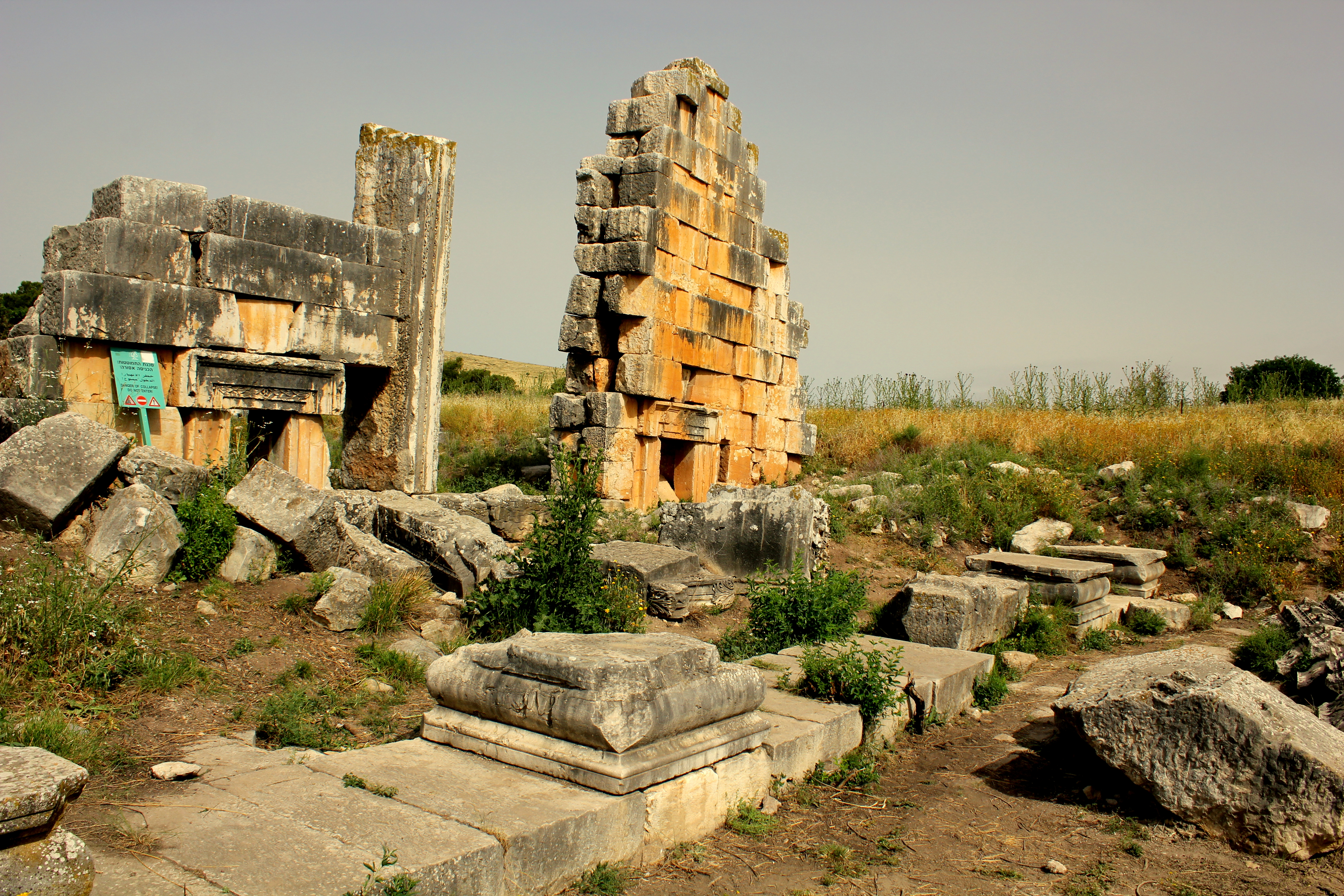 תל קֶדֶשׁ (תל קדס) הוא גן לאומי בהרי נפתלי שבגליל העליון המזרחי, כארבעה ק"מ מערבית לצומת ישע. הגן מכיל בתוכו שני אתרים: תל-קדש שמדרום-מערב לכביש הצפון, והמקדש הרומאי שמצפון-מזרח לכביש. התל הוא הגדול בתילי הגליל העליון. למרגלות התל נובע עין קדש.